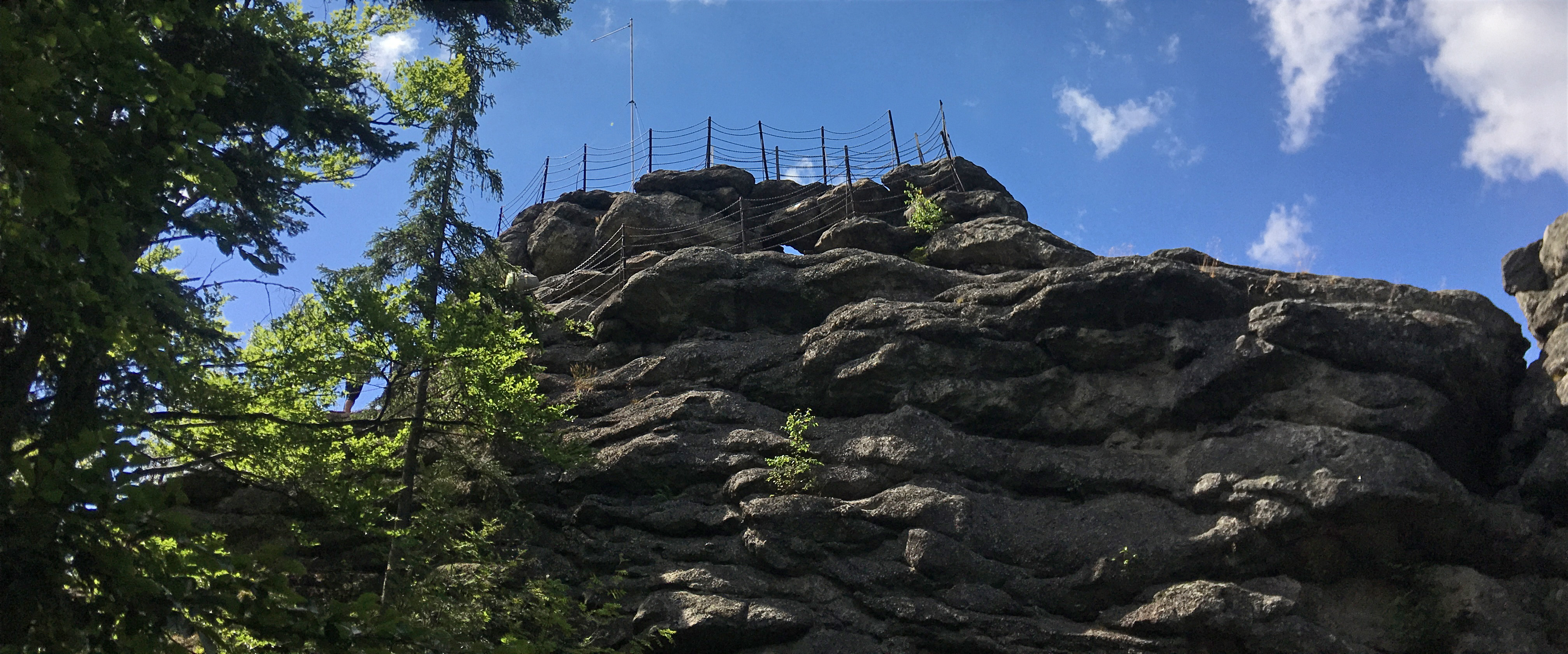 Skalní útvar Čertovy kameny je oblíbenou turistickou destinací. Nachází se na úbočí Zlatého Chlumu nad Českou Vsí u Jeseníka.